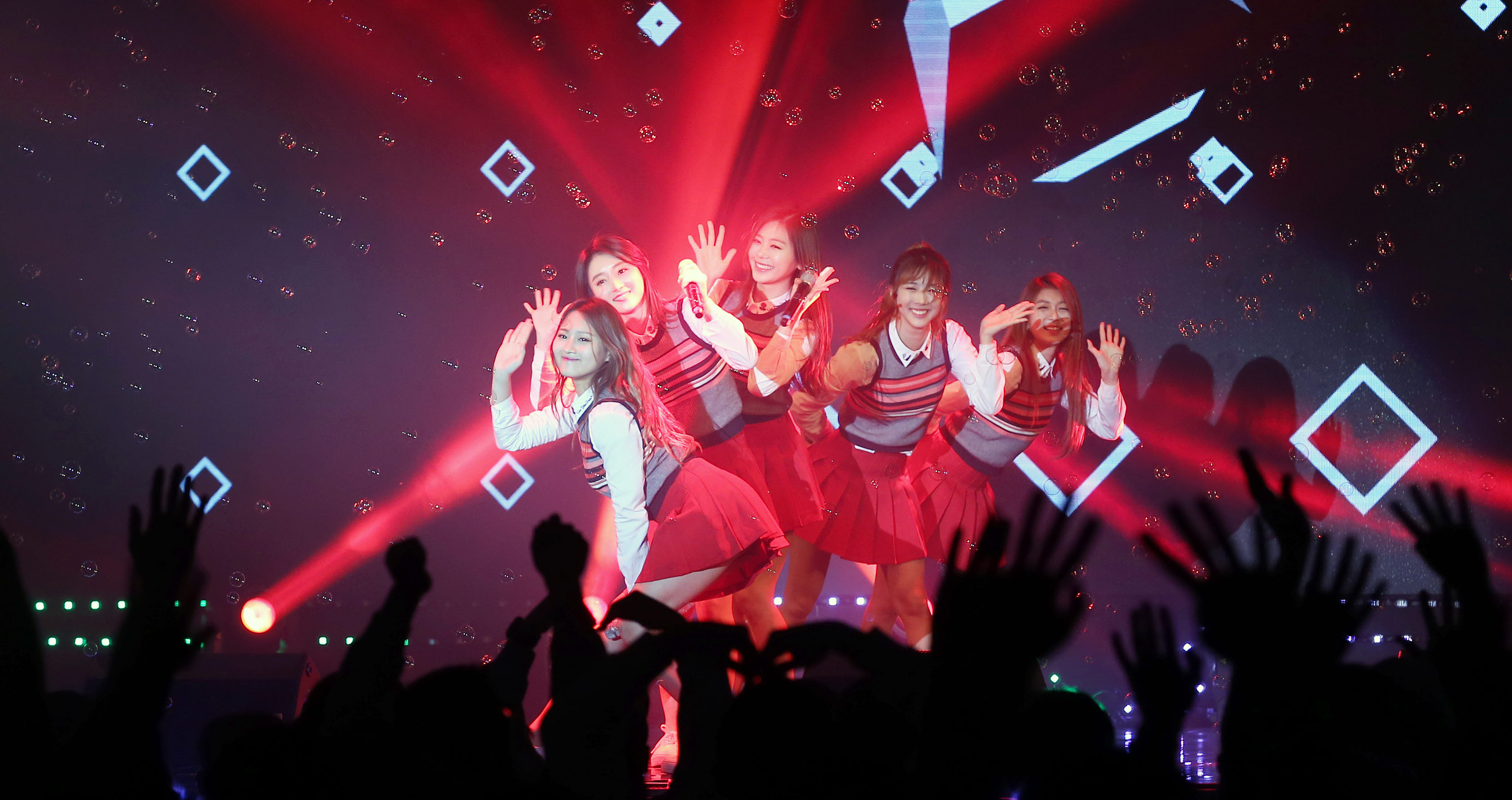 Hello, Mr K! Concert MINX April 21, 2016 US Army Garrison-Yongsan Ministry of Culture, Sports and Tourism Korean Culture and Information Service ( Official Photographer : Jeon Han This official Republic of Korea photograph is being made available only for publication by news organizations and/or for personal printing by the subject(s) of the photograph. The photograph may not be manipulated in any way. Also, it may not be used in any type of commercial, advertisement, product or promotion that in any way suggests approval or endorsement from the government of the Republic of Korea. 헬로, 미스터 K! 콘서트 밍스 2016-04-21 주한 미육군 용산기지 문화체육관광부 해외문화홍보원 코리아넷 전한